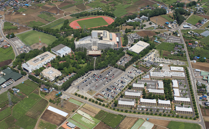 松本歯科大学全景